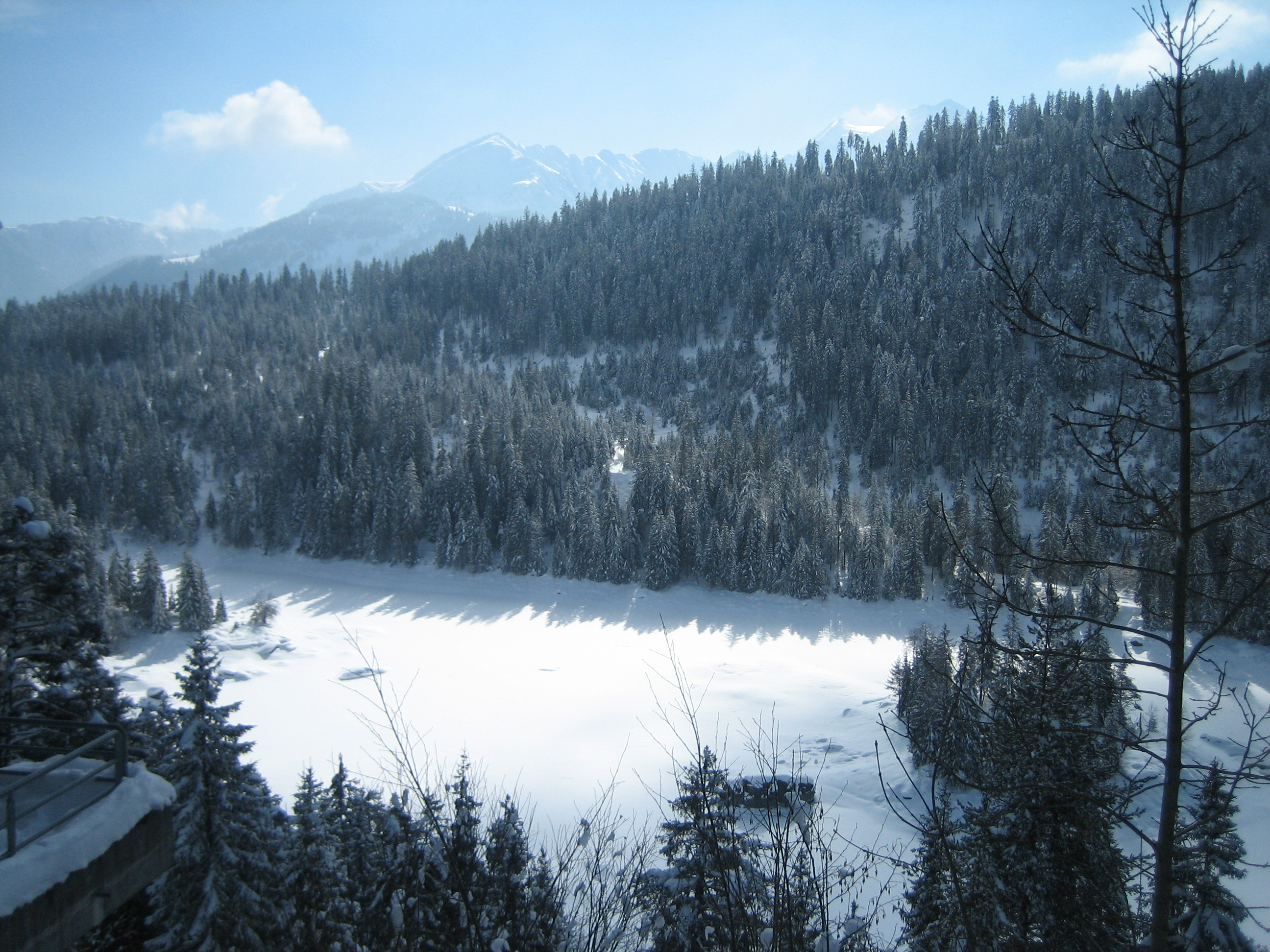 Caumasee im Winter 2009